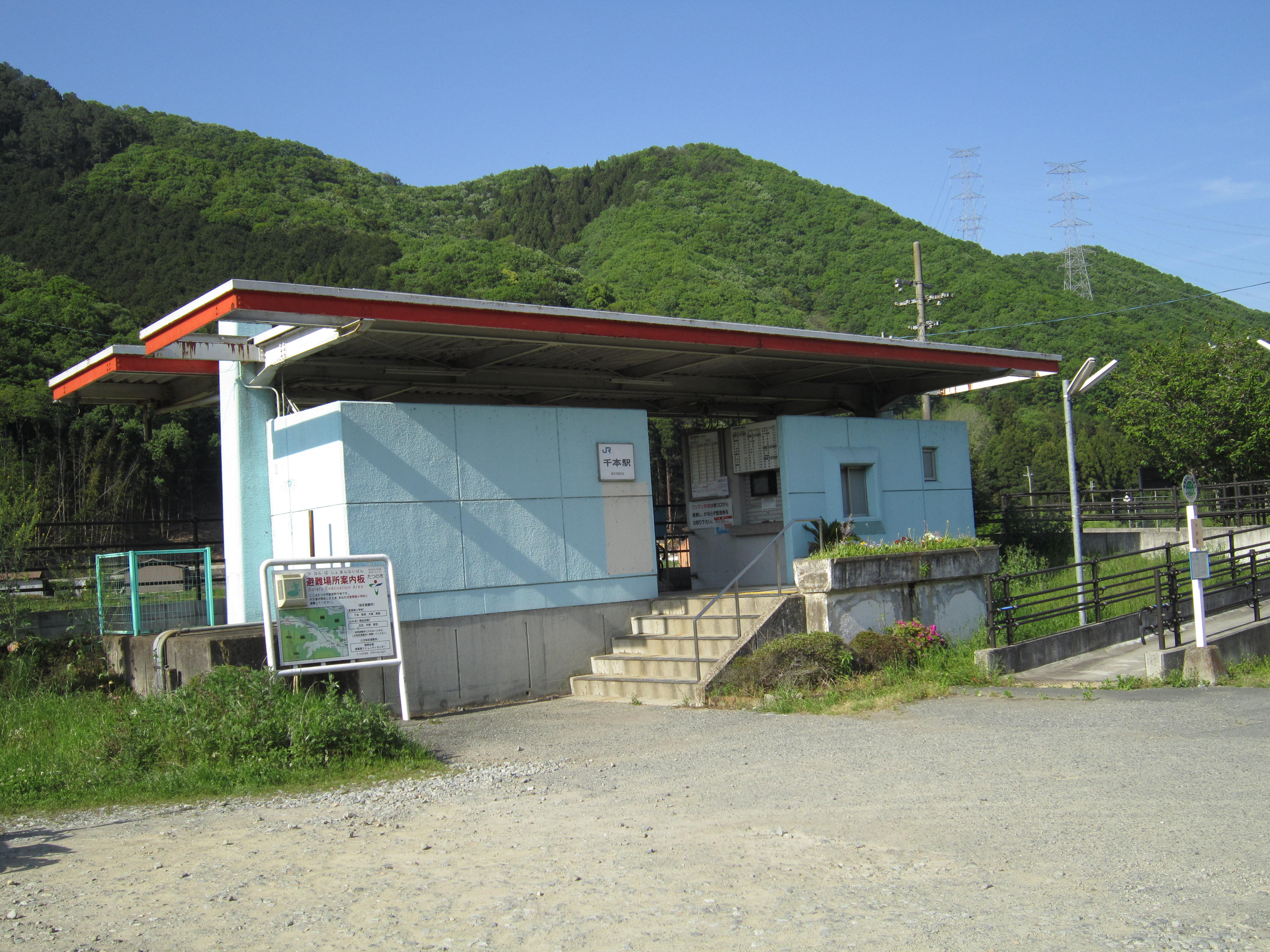 JR西日本姫新線の駅。千本駅出入り口。